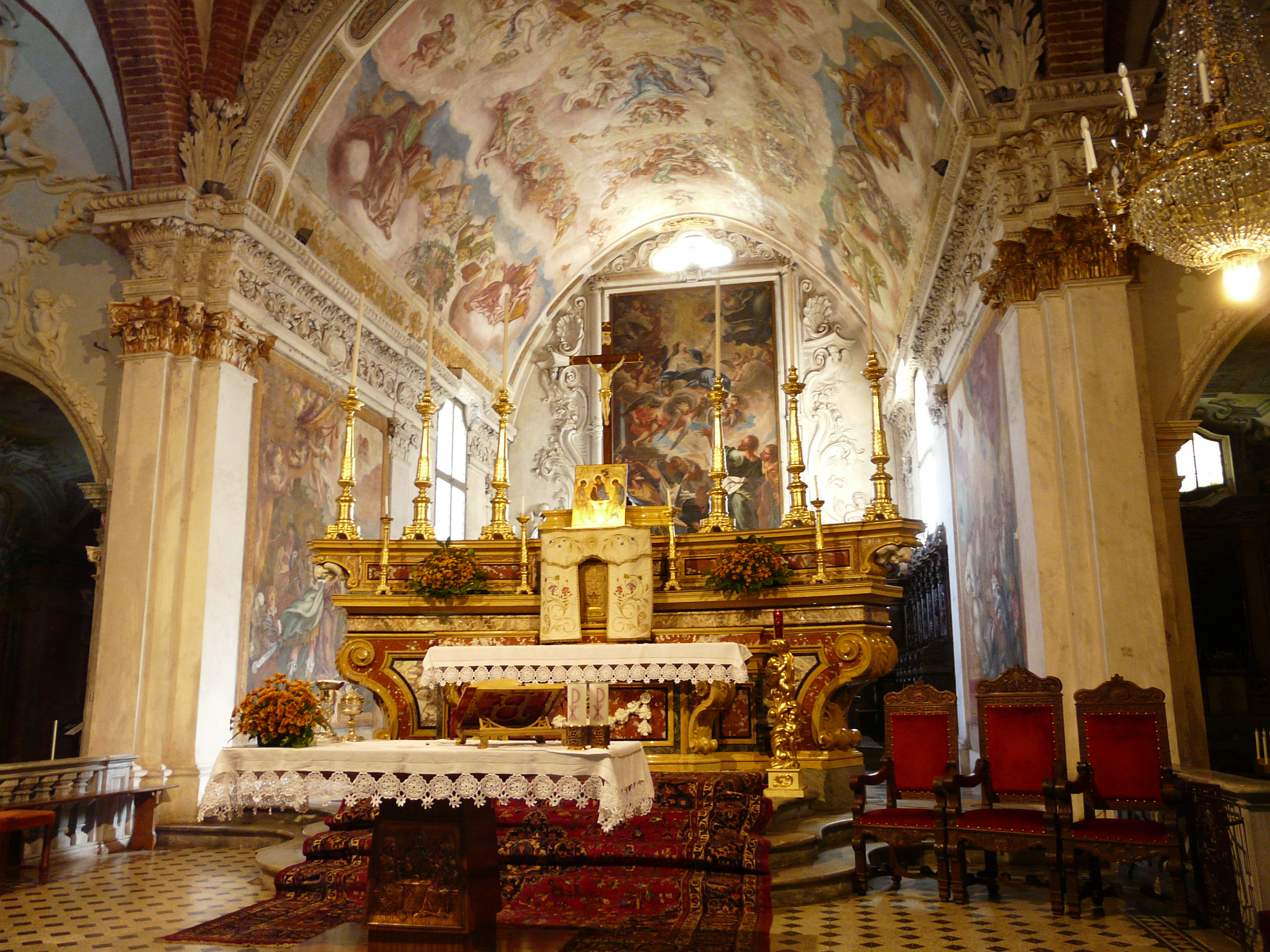 Altare maggiore dell'abbazia di Santa Maria di Casanova, frazione di Casanova, Carmagnola, Piemonte, Italia